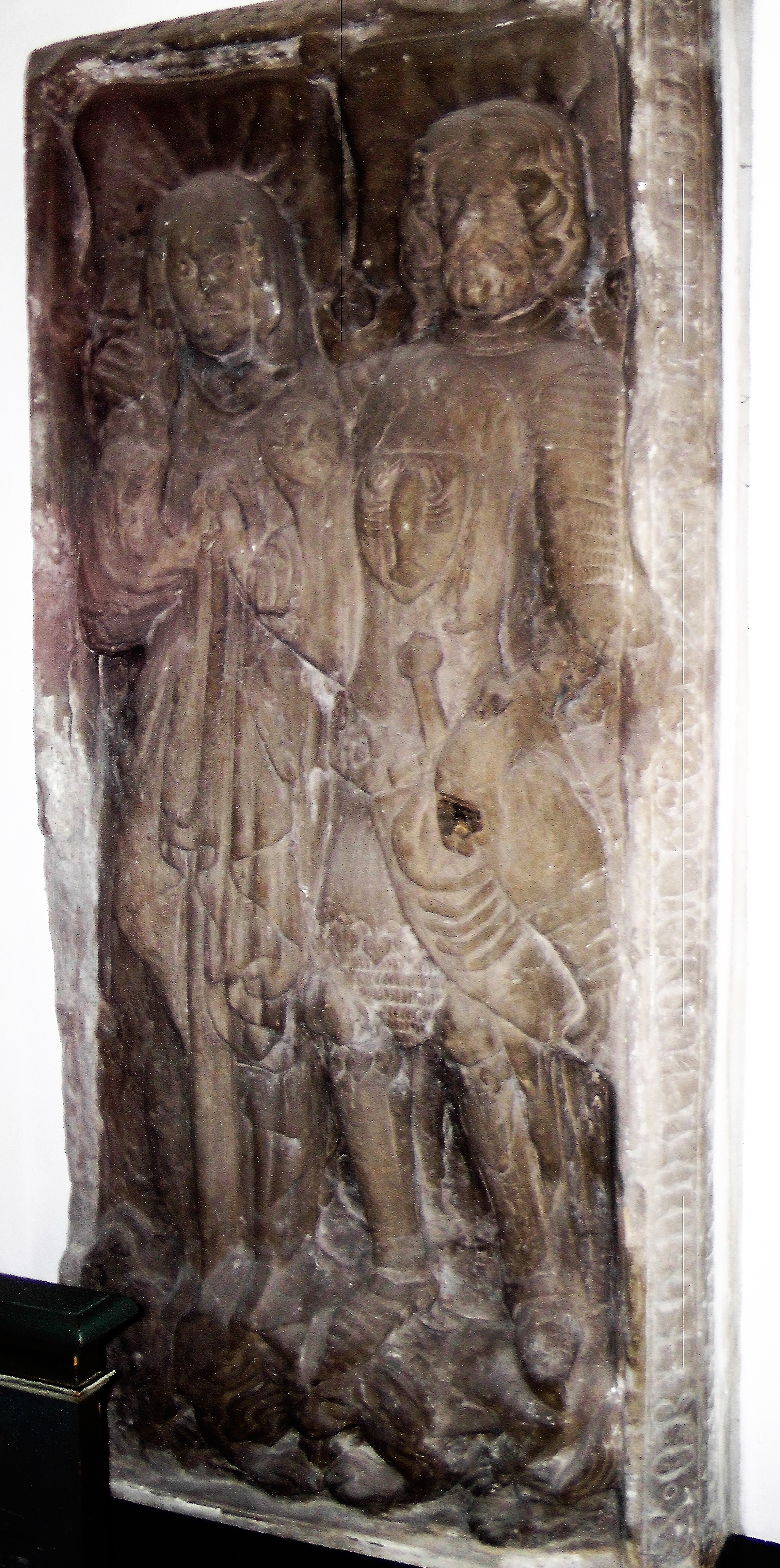 Fredehelm von Cottbus mit Frau, Krebswappen im Schild und Brustharnisch